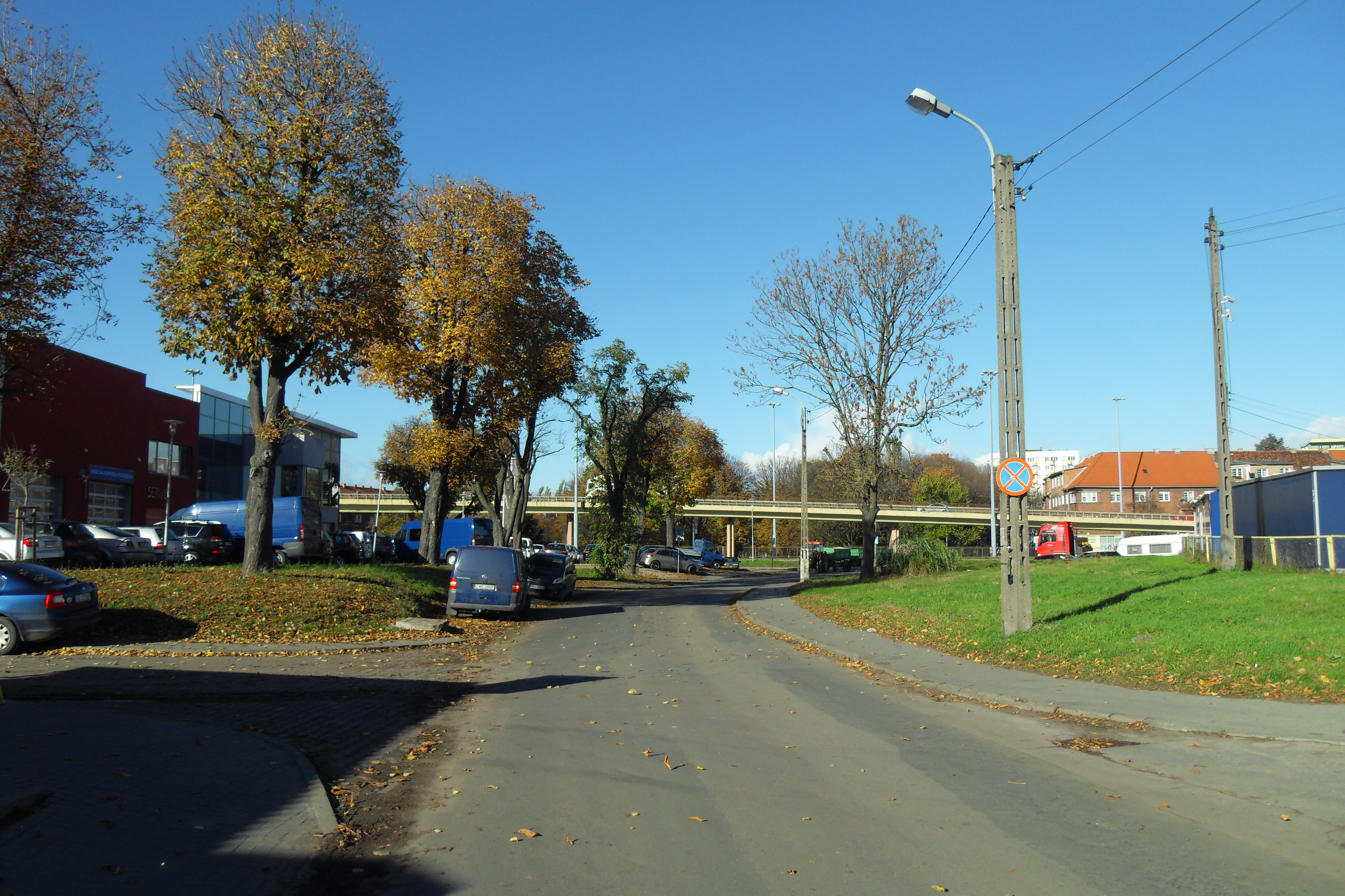 Gdańsk Śródmieście, ul. Zawodników. W tym miejscu znajdowała się nieistniejąca stacja Gdańsk Wąskotorowy.